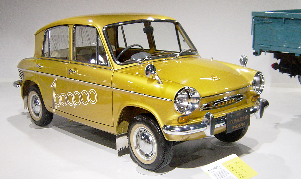 Mazda carol 600(マツダ・キャロル),Mazda Museum